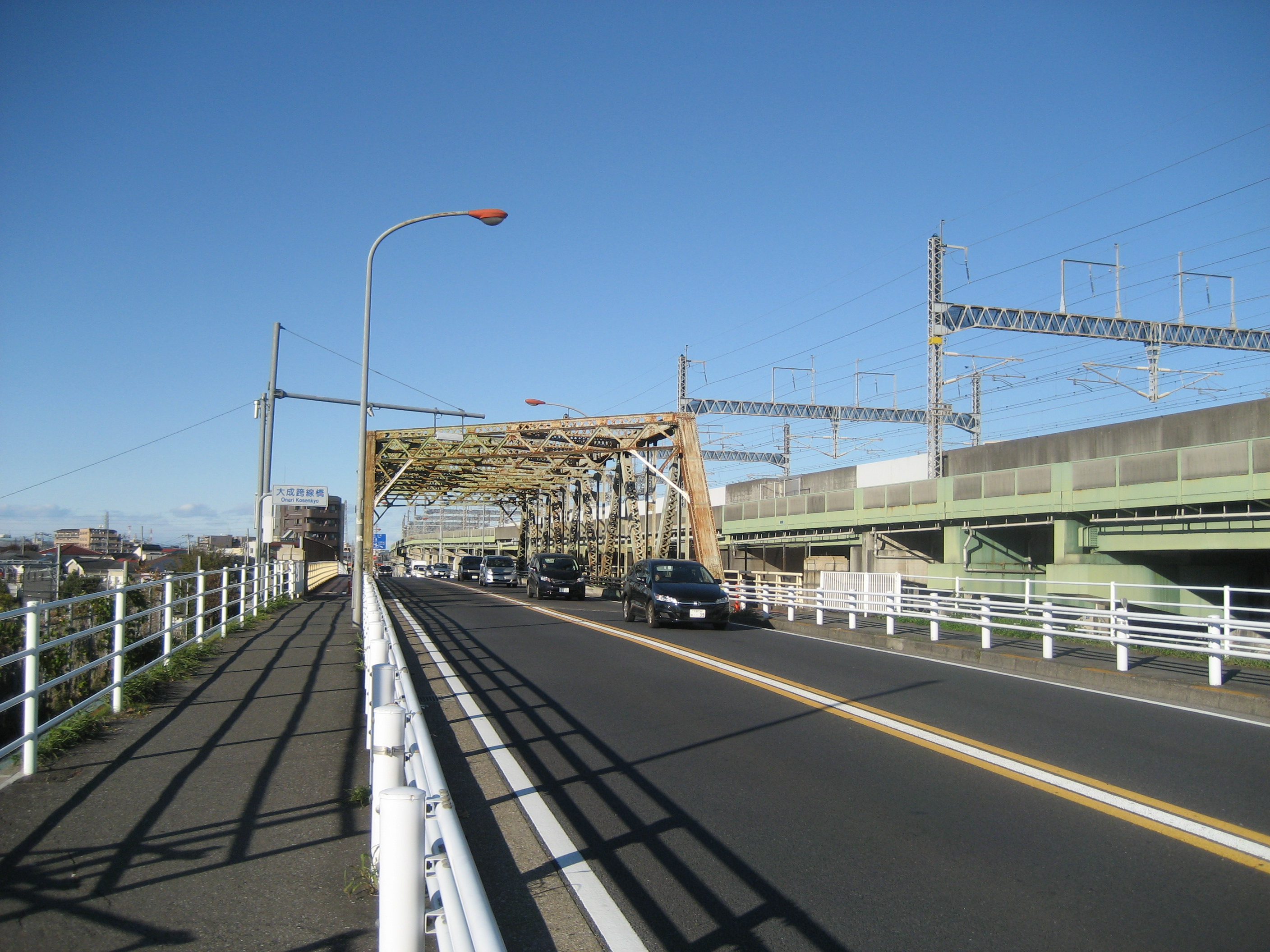 国道17号線さいたま市北区大成町大成跨線橋付近